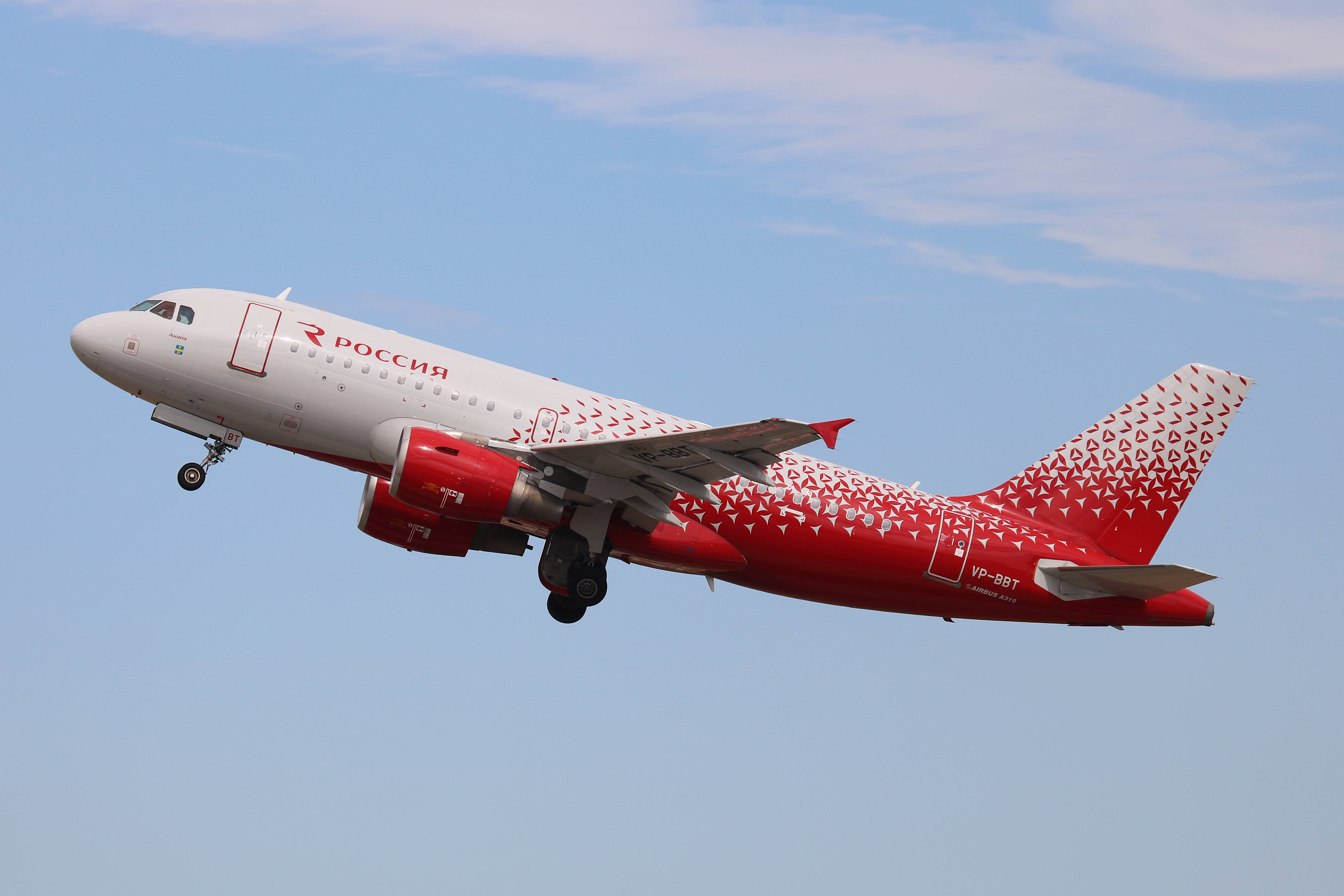 Flughafen Düsseldorf, Airbus A319-100 (VP-BBT) der Rossiya